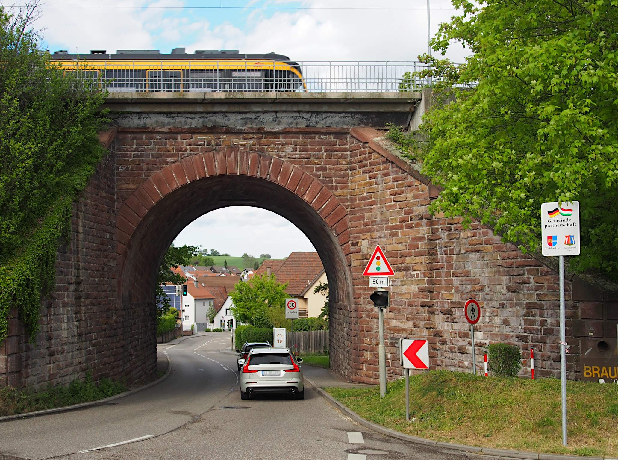 Eisenbahnbrücke in Jöhlingen